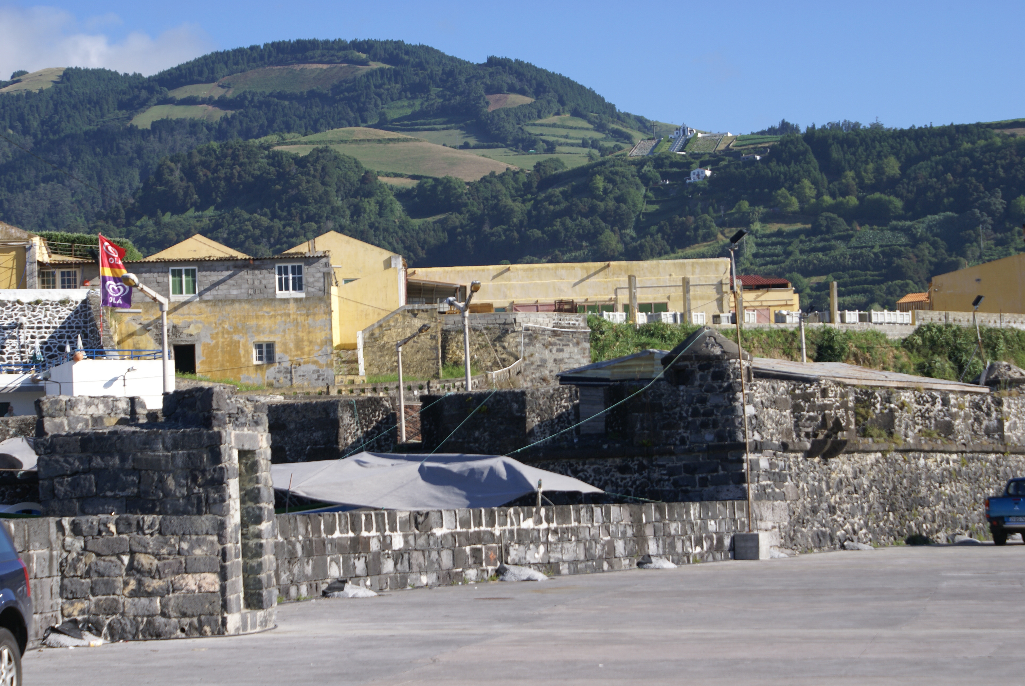 Forte do Tagarete, porto de Vila Franca do Campo, ilha de São Miguel, Açores.